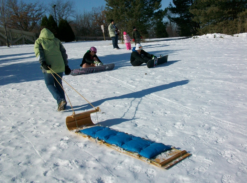 Современные сани тобогган